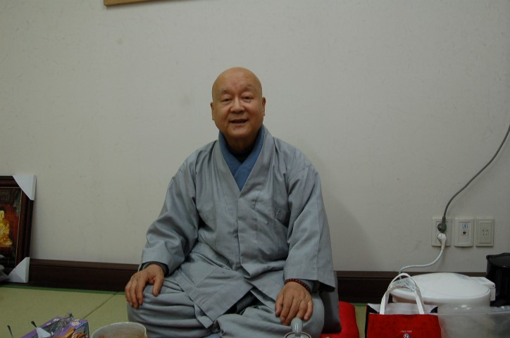 印幻禅師（In Hwan seunim）